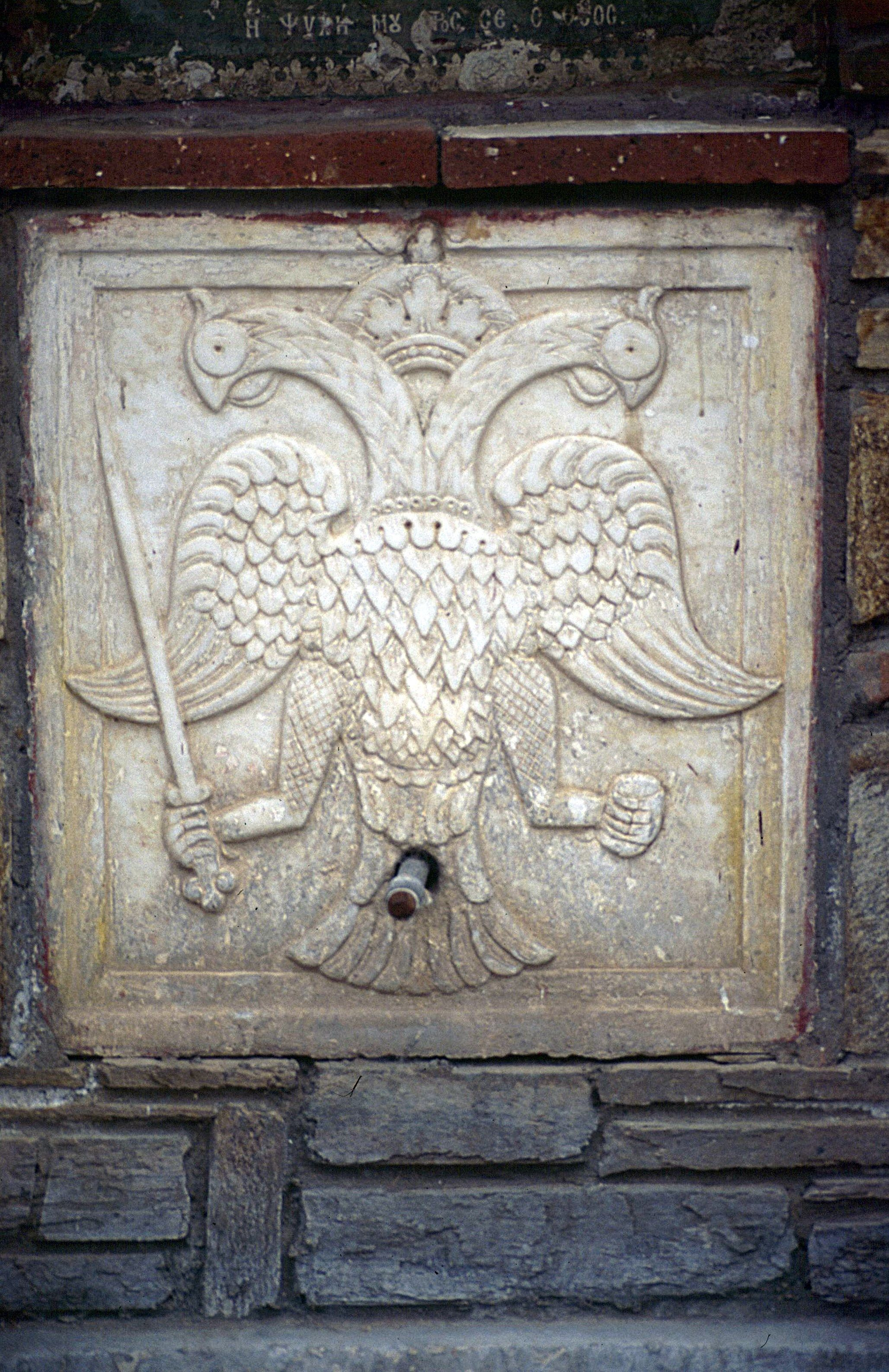 Emblem der Republik Athos